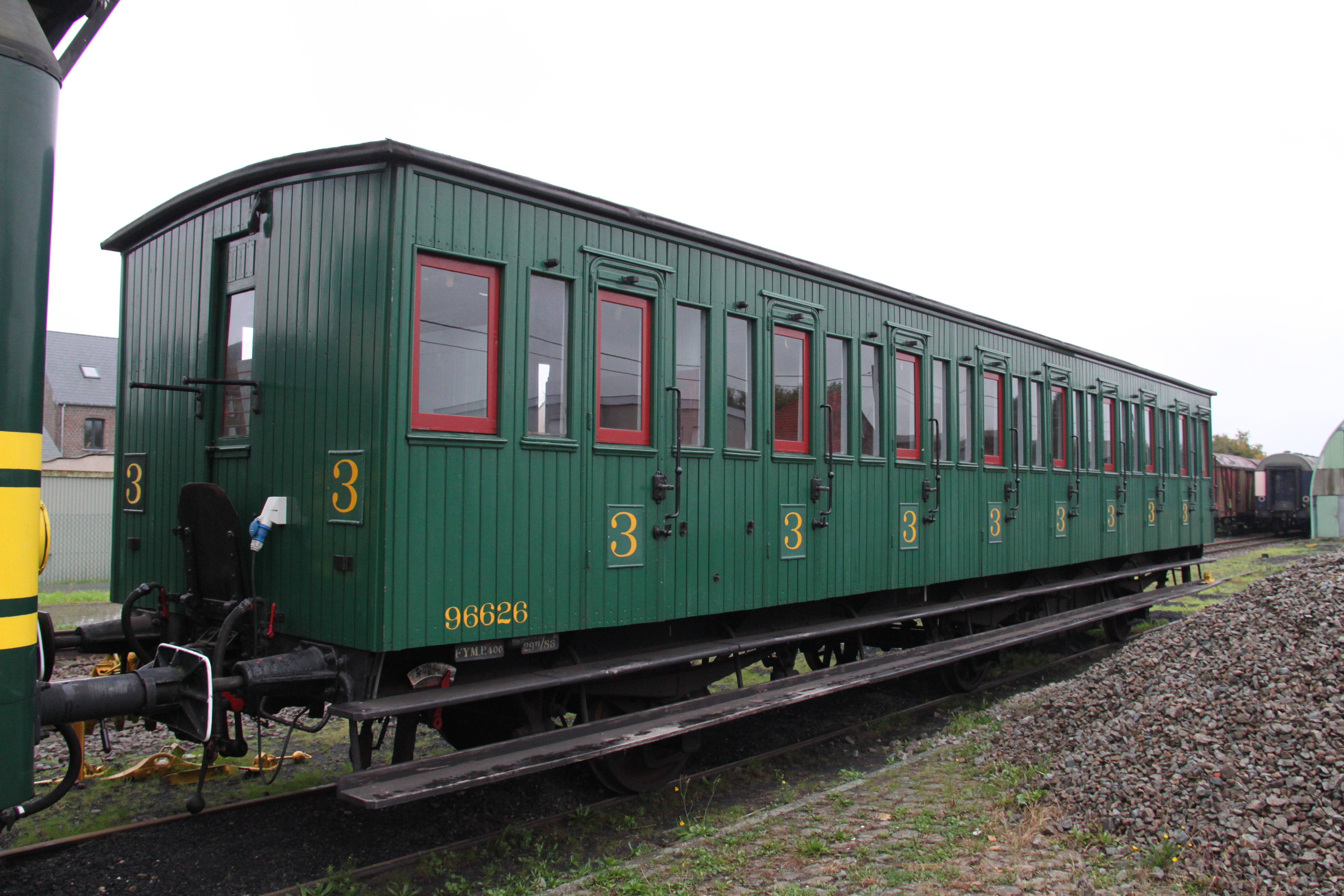 Rijtuig van de Stoomtrein Dendermonde - Puurs